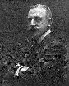 Portrait d'Arthur Hugenschmidt (1862-1929), photographie anonyme du début du XXe siècle.